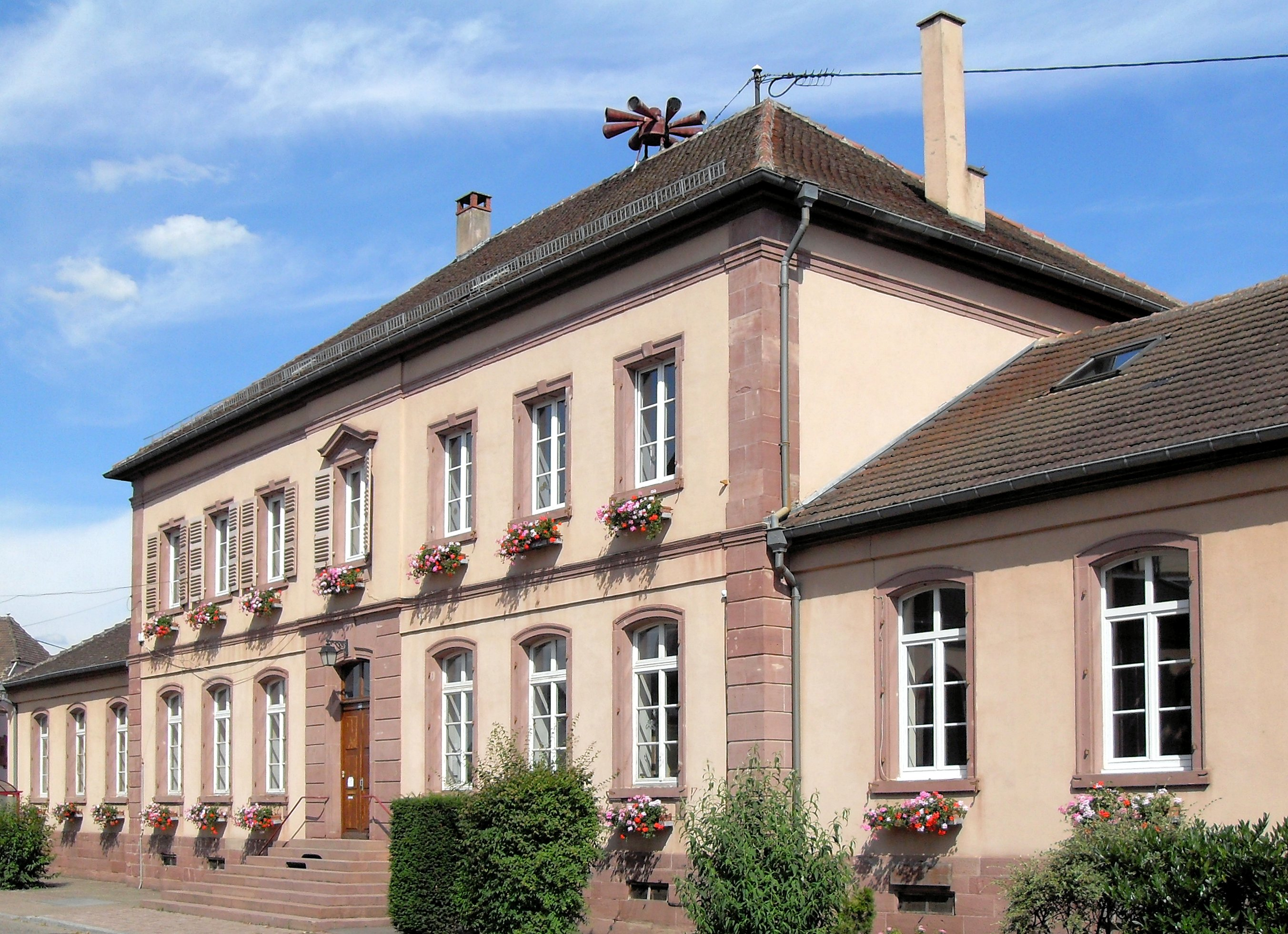 L'école d'Oberhergheim